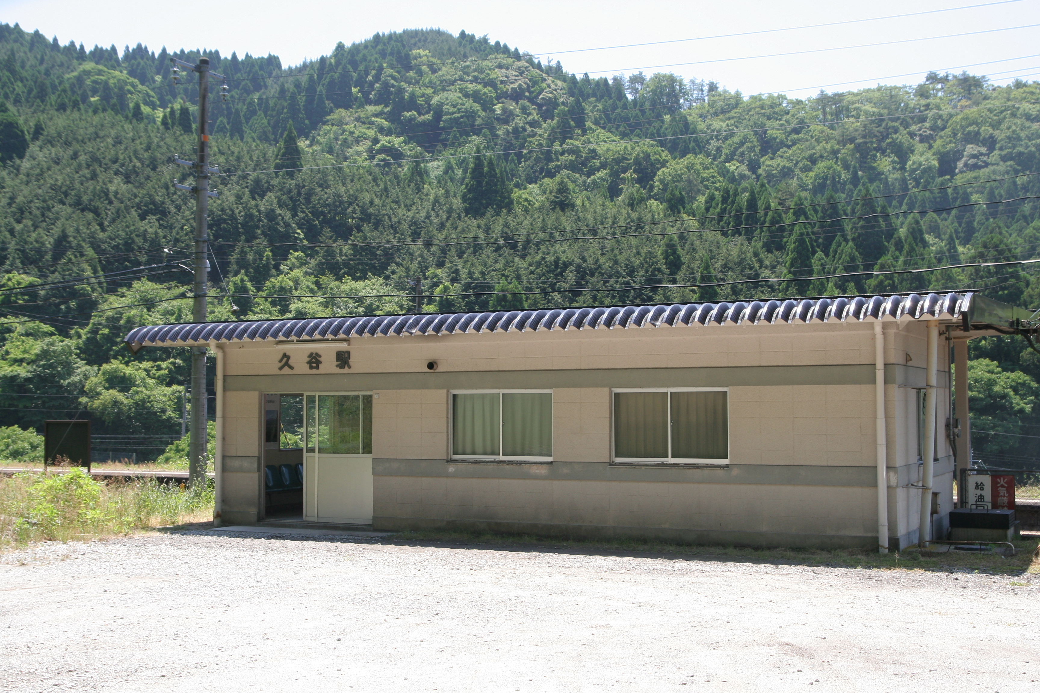 久谷駅の駅舎